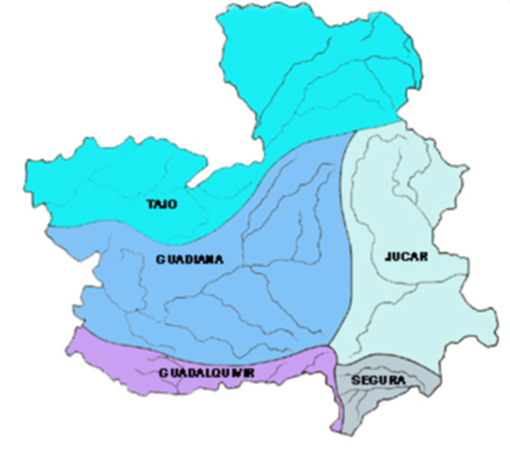 mapa hidrografico de Castilla-La Mancha